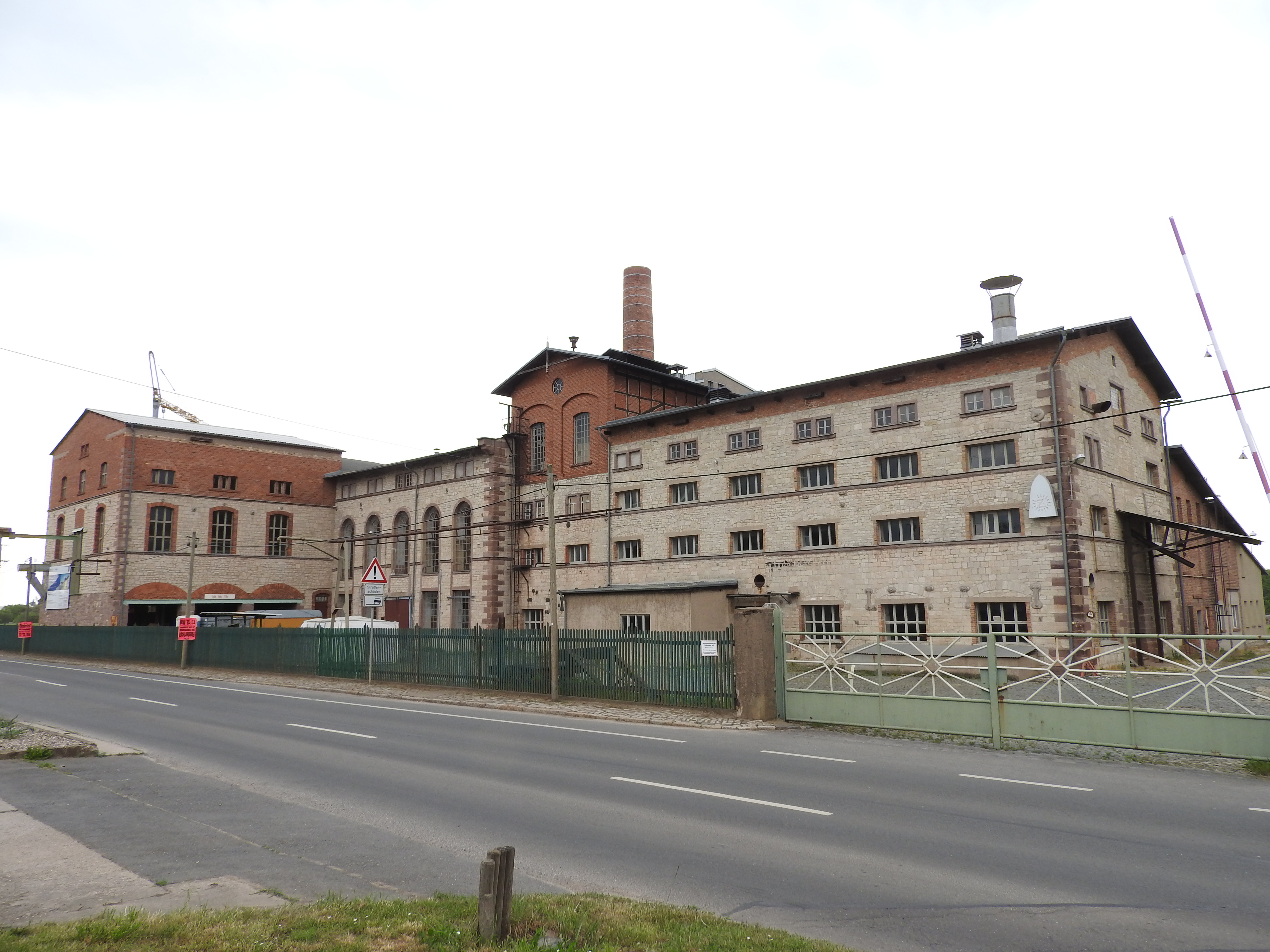 Zuckerfabrik in Oldisleben, Thüringen